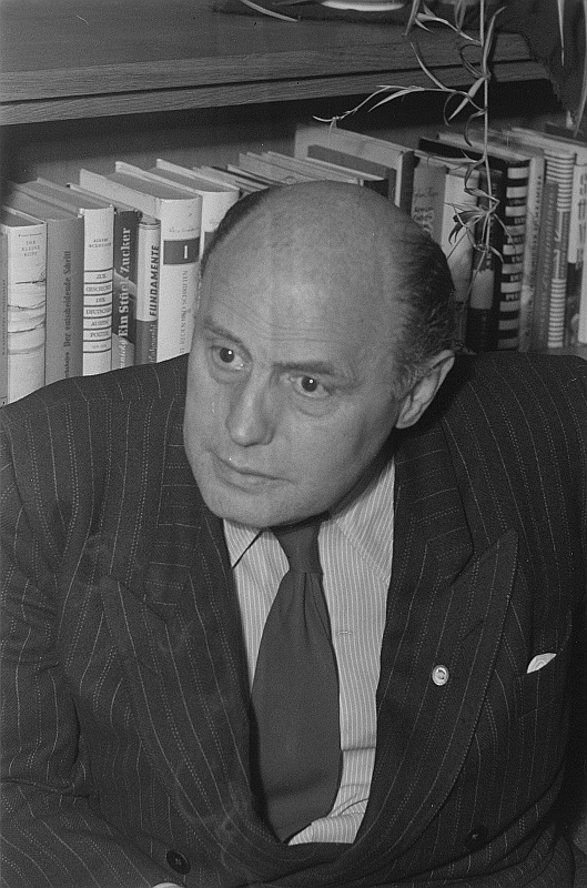 Original image description from the Deutsche FotothekPorträt von Ferdinand May